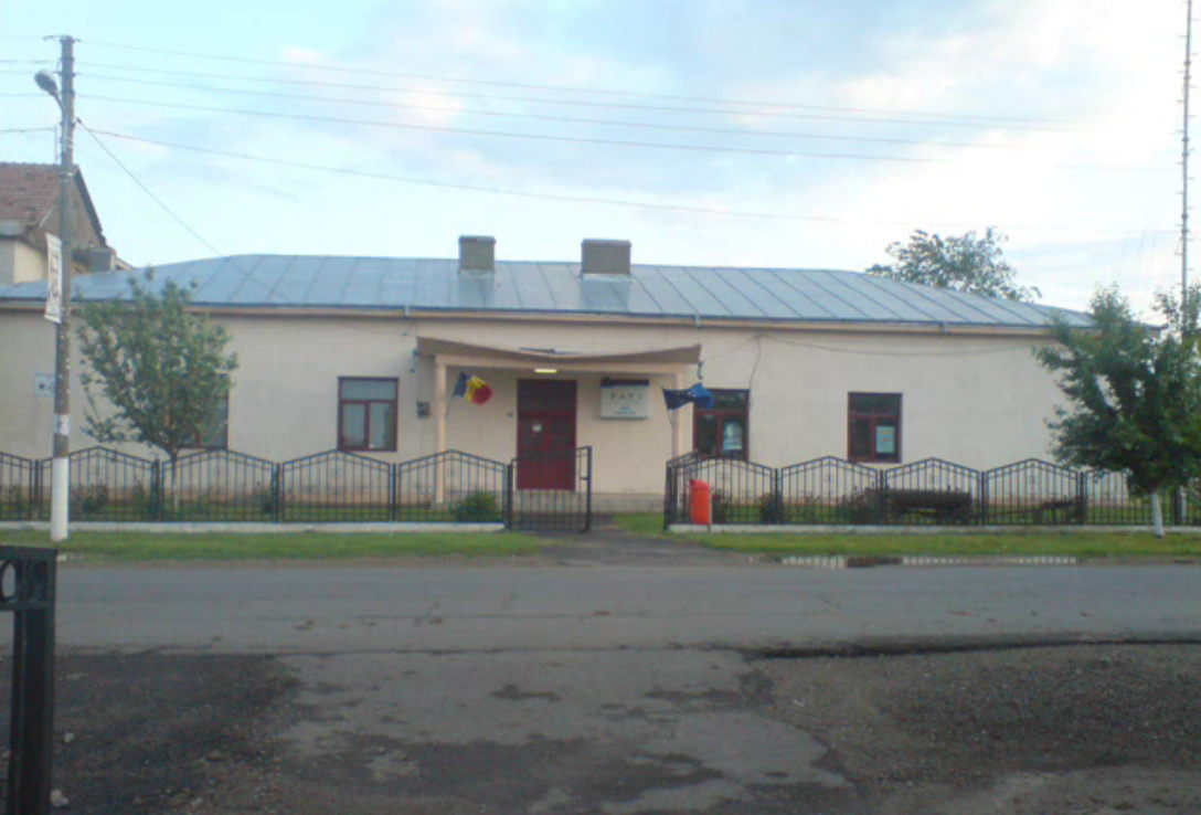 Căminul cultural din Bordei Verde, judeţul Brăila Clădire publică